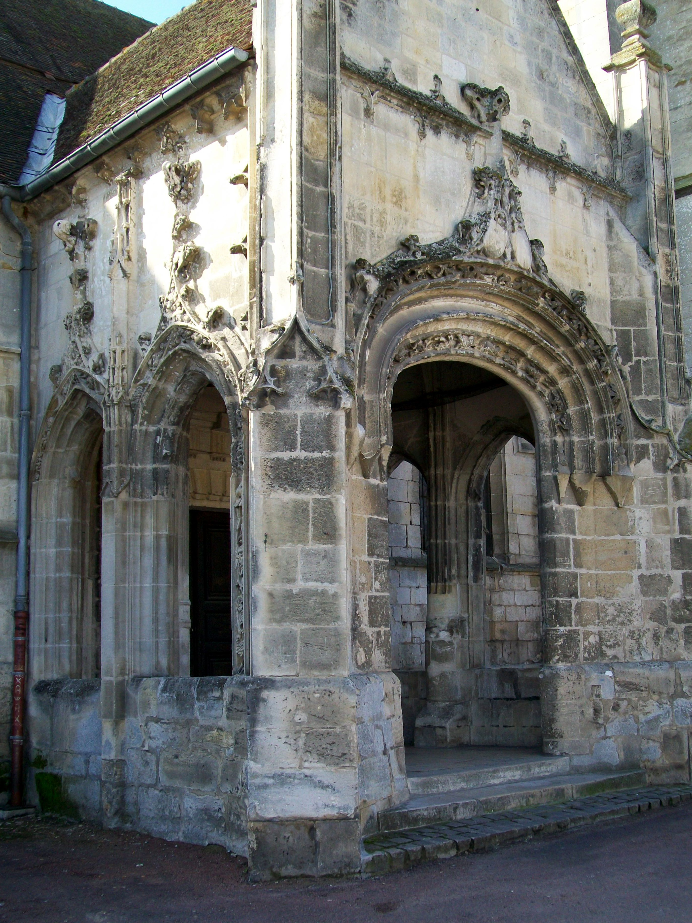 Le porche de l'église Saint-Honoré, son élément architectural le plus remarquable vers l'extérieur.